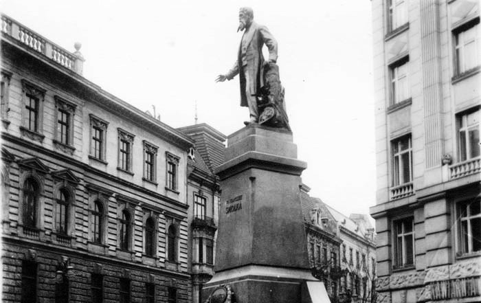 Памятник Францишеку Яну Смолке (1810—1899) — польскому адвокату, либеральному политику, общественному деятелю, президенту парламента Австрии во Львове (не существует)